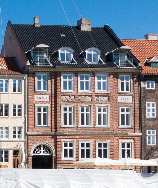 Nyhavn 64 in Copenhagen, enmark